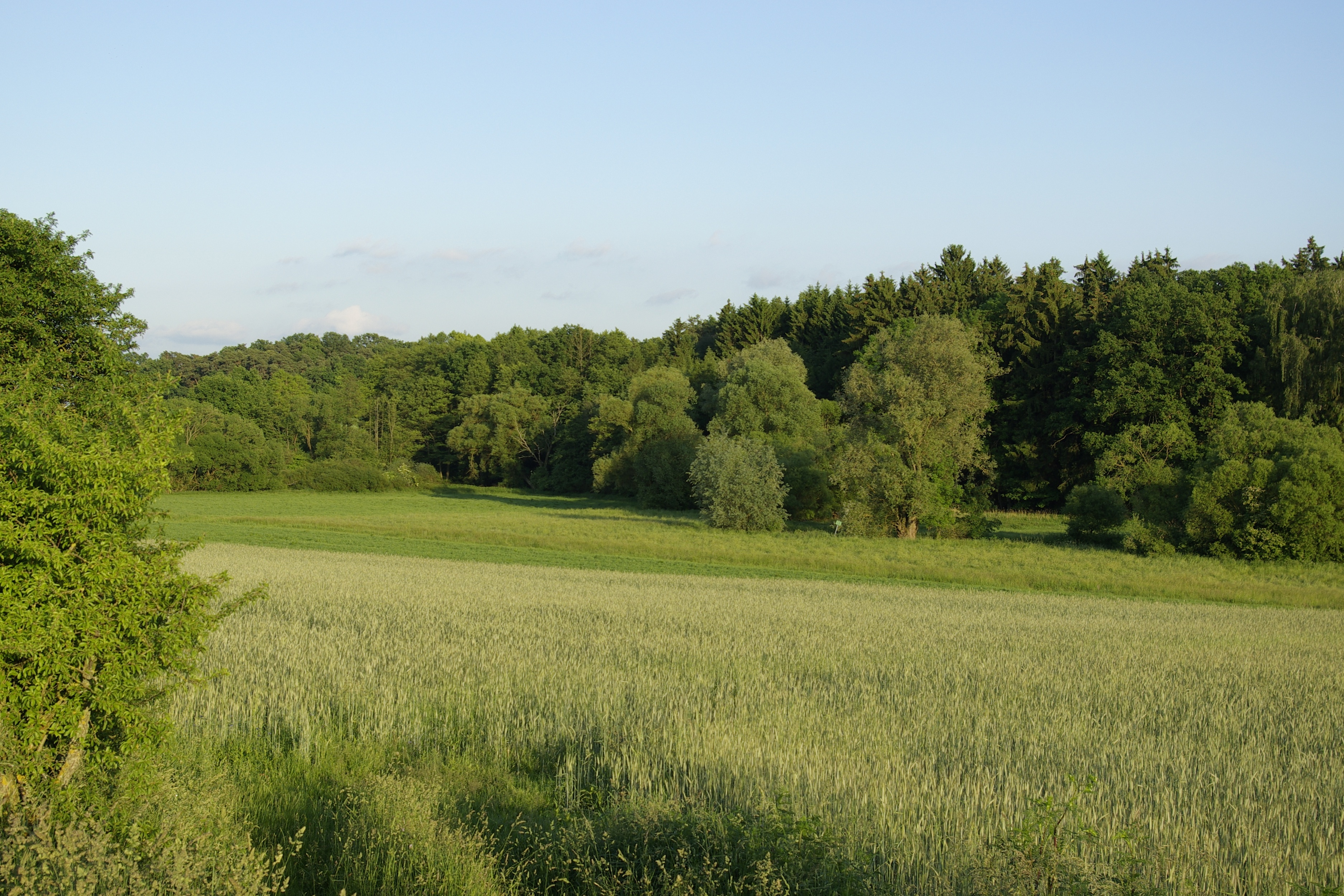 Das Zenntal bei Rothenberg (Obermichelbach), im Hintergrund der Zennwald.